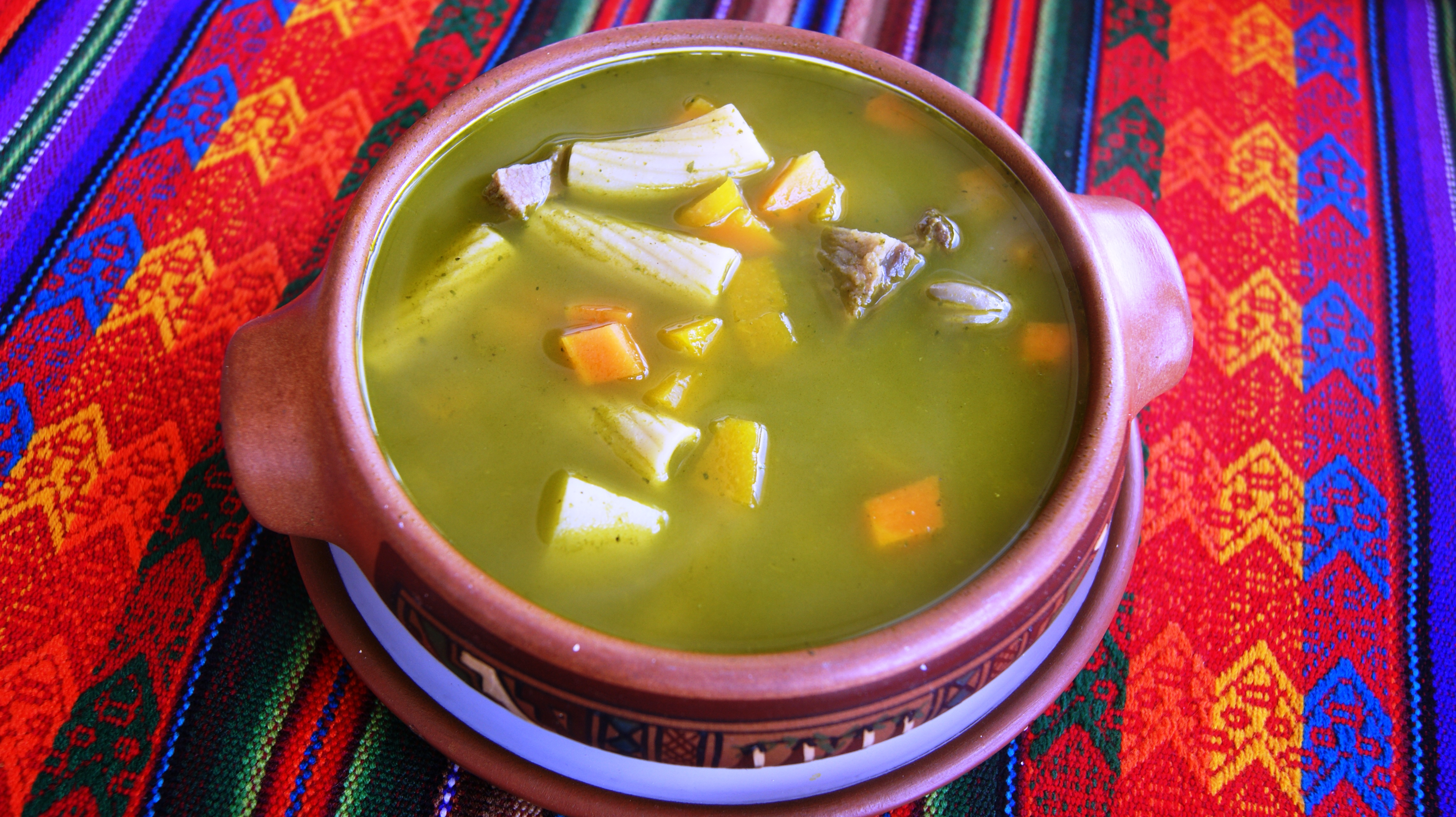 Plato de Menestròn. Restaurante "Café Bagdad". Cusco - Perú.